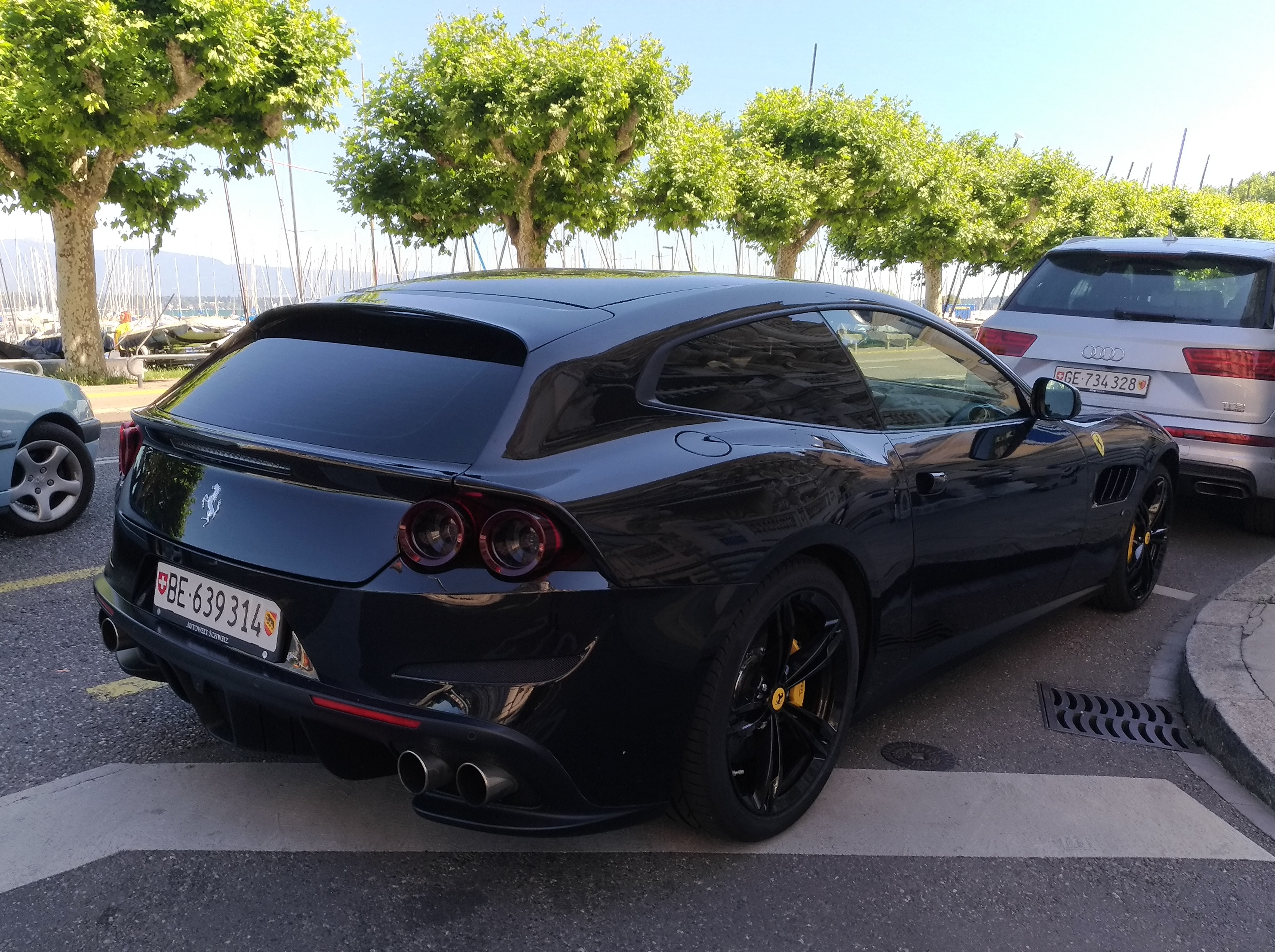 Ferrari GTC4Lusso